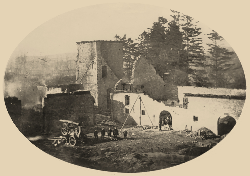 Le Château de Bure, cour intérieure lors de l'incendie de 1918. Archives du Collège d'Alzon.